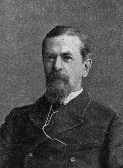 Полевой, Пётр Николаевич